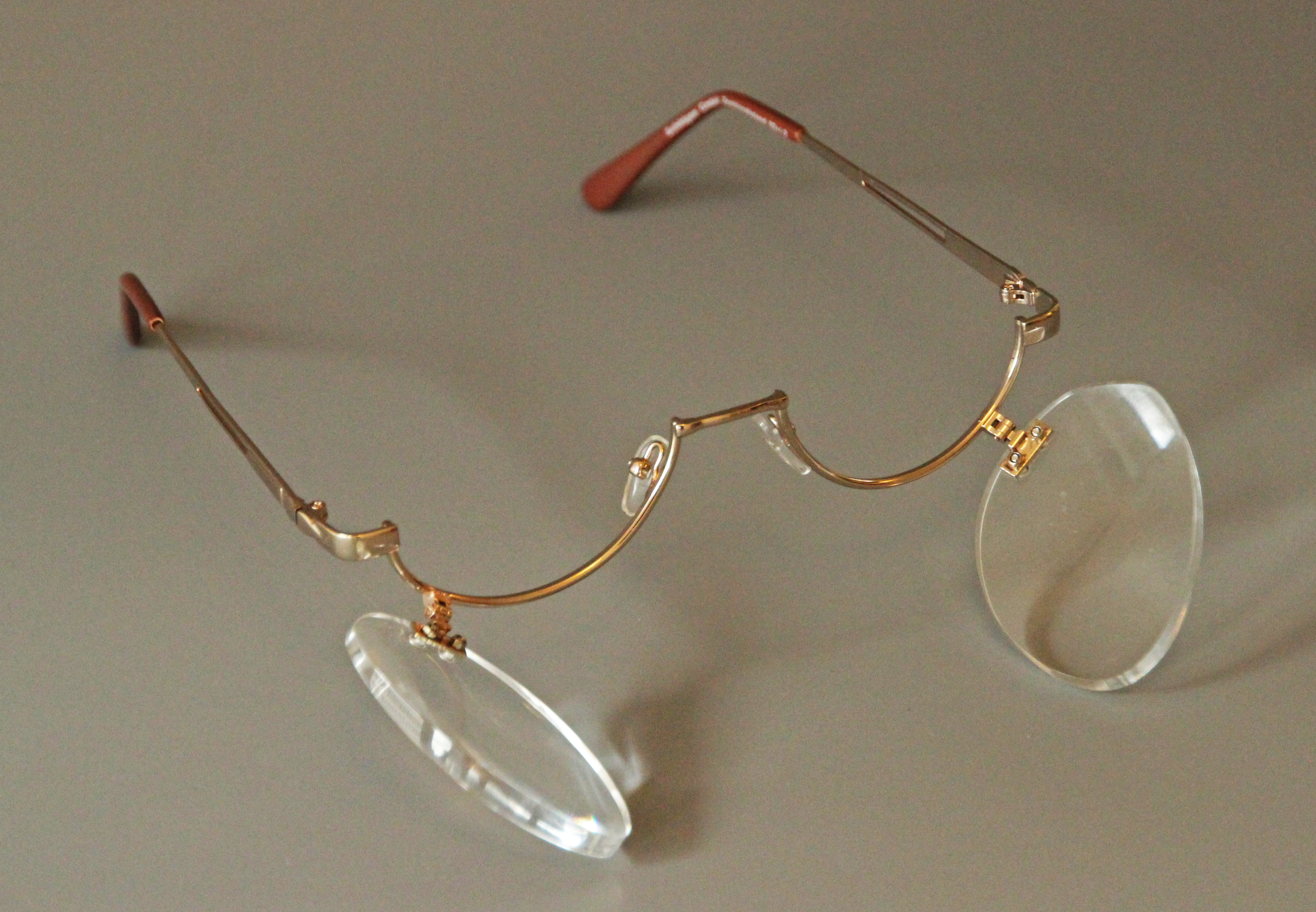 Bildinhalt: Schminkbrille mit aufgeklappten Gläsern Aufnahmeort: Frankfurt am Main, Deutschland